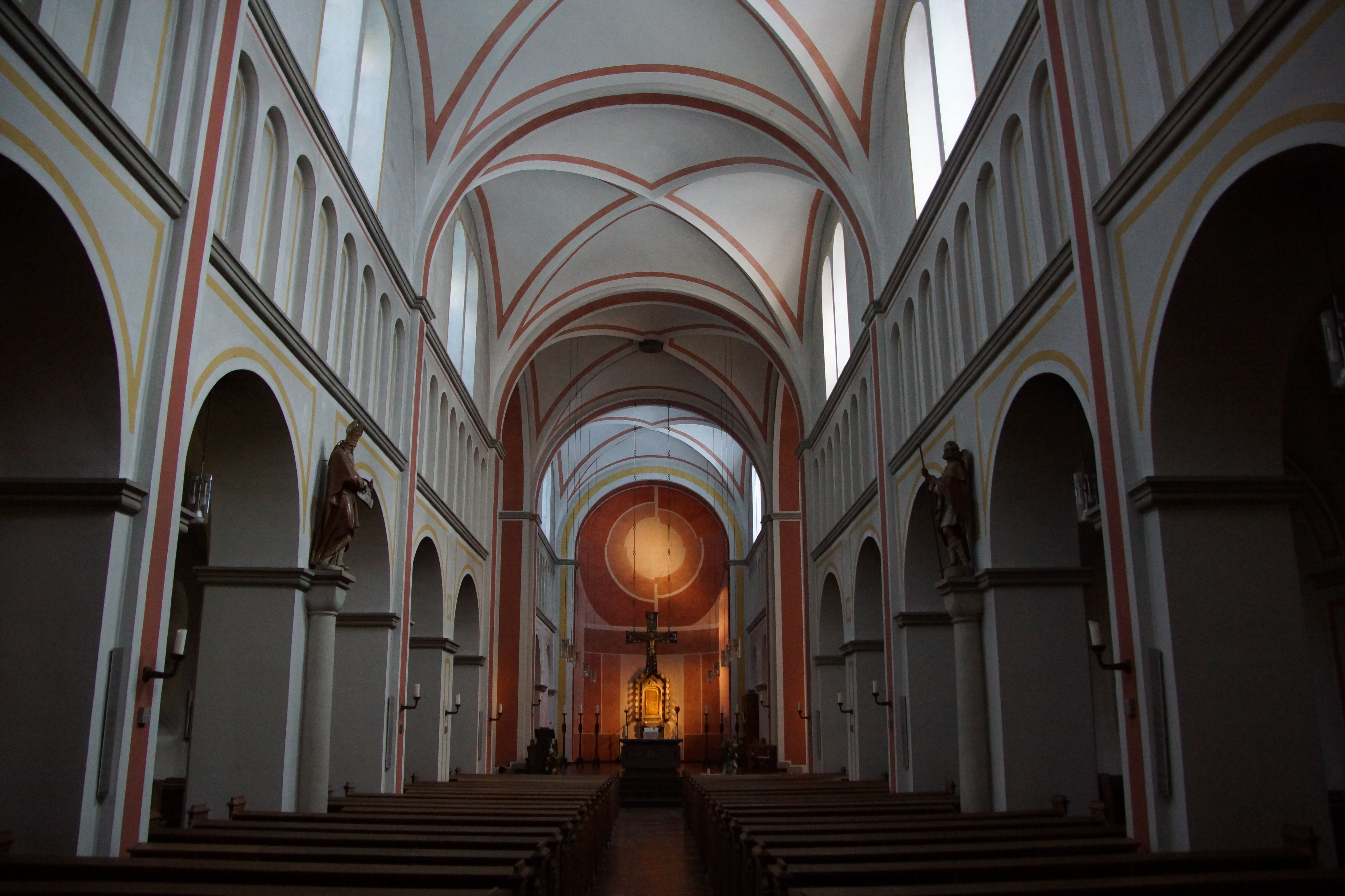 Katholische Kirche Sankt Audomar in Frechen, Innenraum